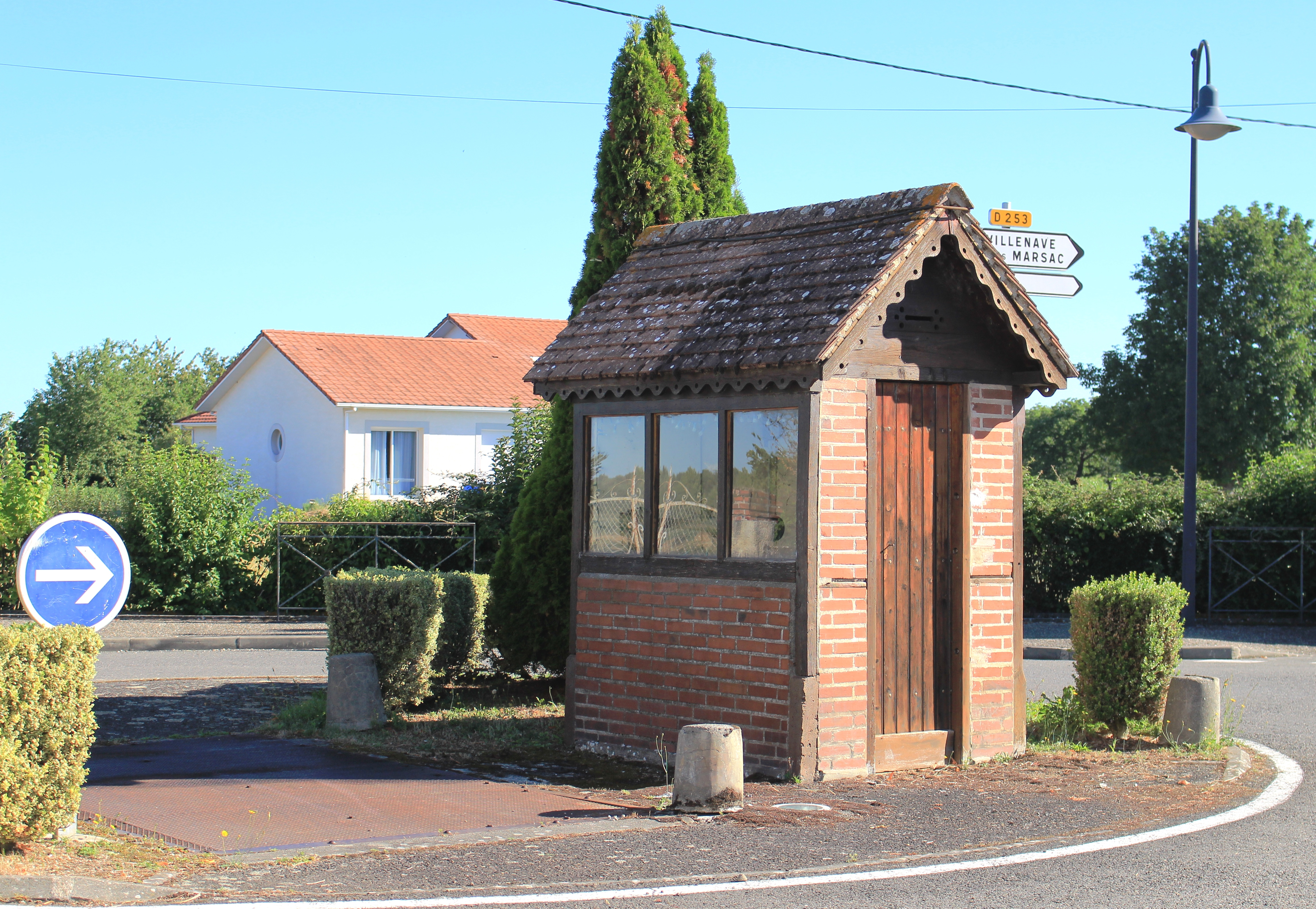 Bascule de Marsac (Hautes-Pyrénées)